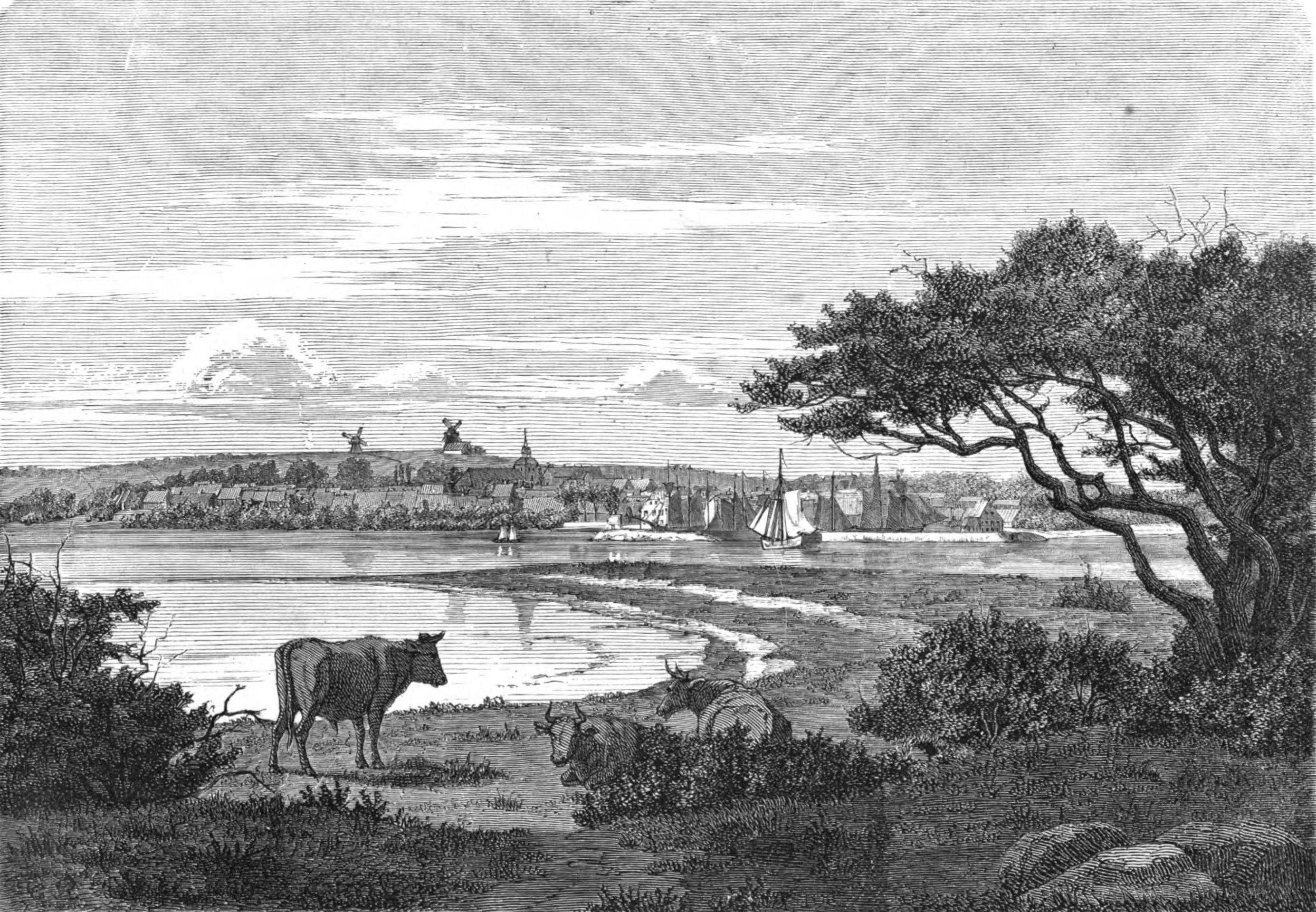 Del av Ærøskøbing på ön Ærø i Danmark, sedd från Dejrø.